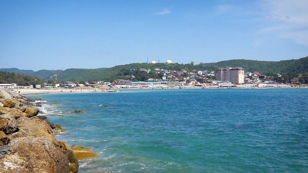 Вид на посёлок Джубга